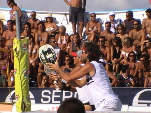 Paolo Tazzari y Alessandro Calbucci jugando la final del Campeonato europeo del 2009